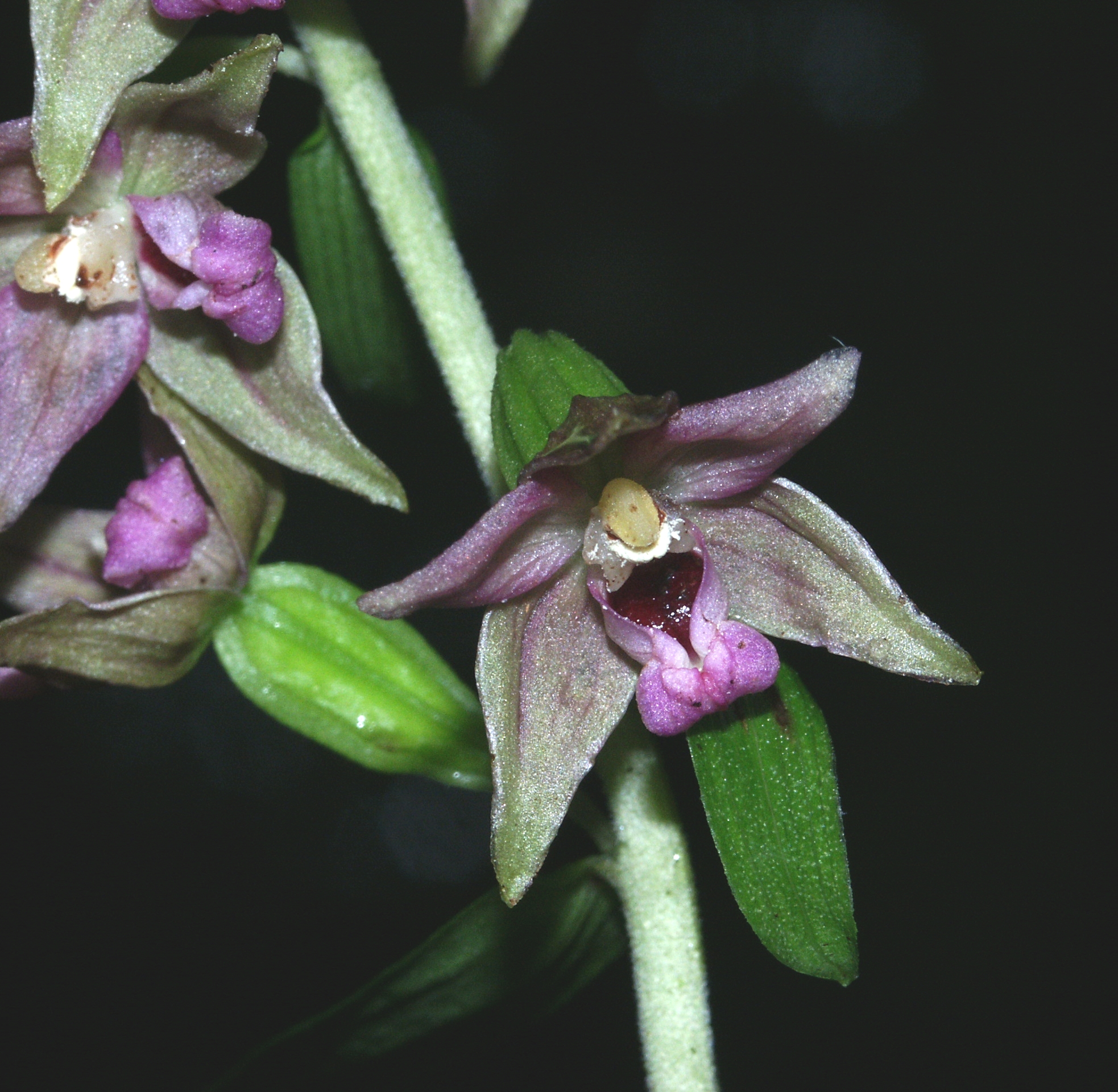 Epipactlis leptochila subsp. neglecta, Baden-Württemberg, Germany